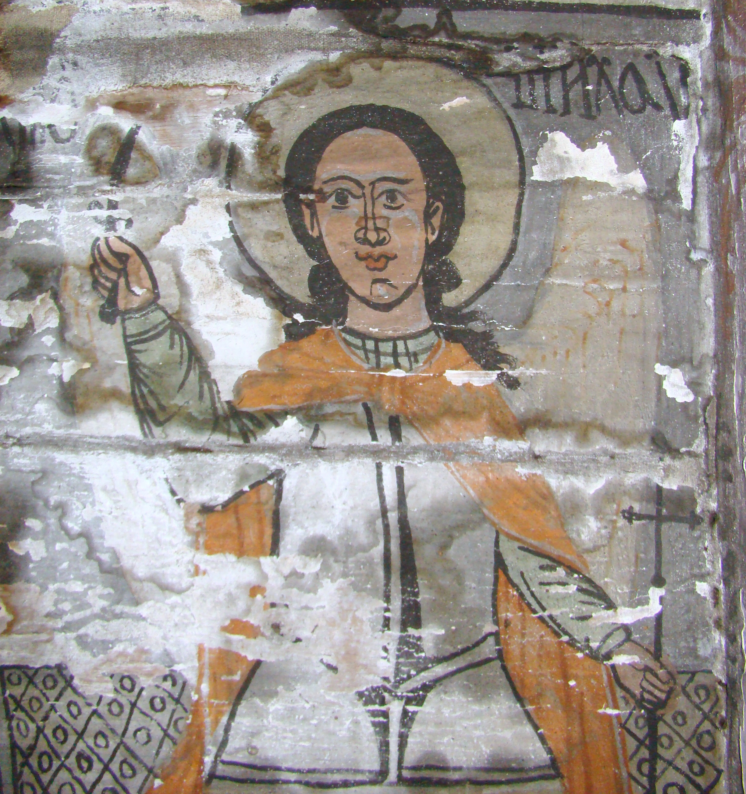 Biserica de lemn din Stolna, județul Cluj